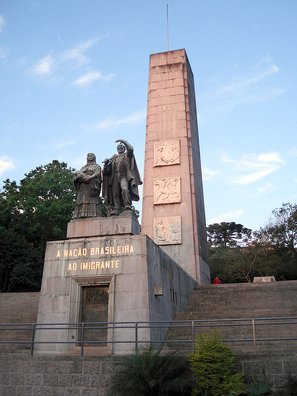 Monumento Nacional ao Imigrante, em Caxias do Sul, Brasil. Cores editadas